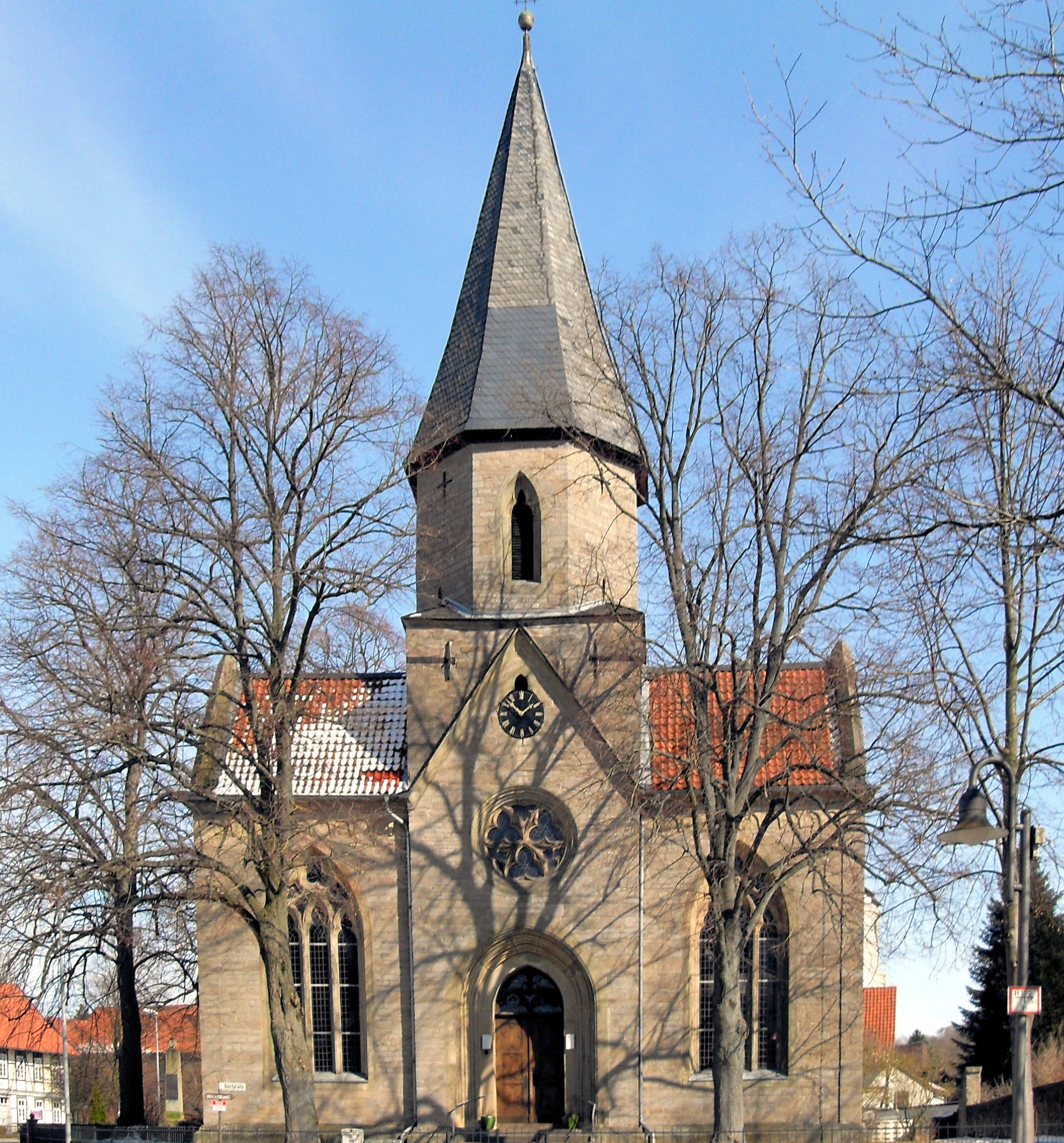 evangelische Kirche in Bornhausen, Landkreis Goslar